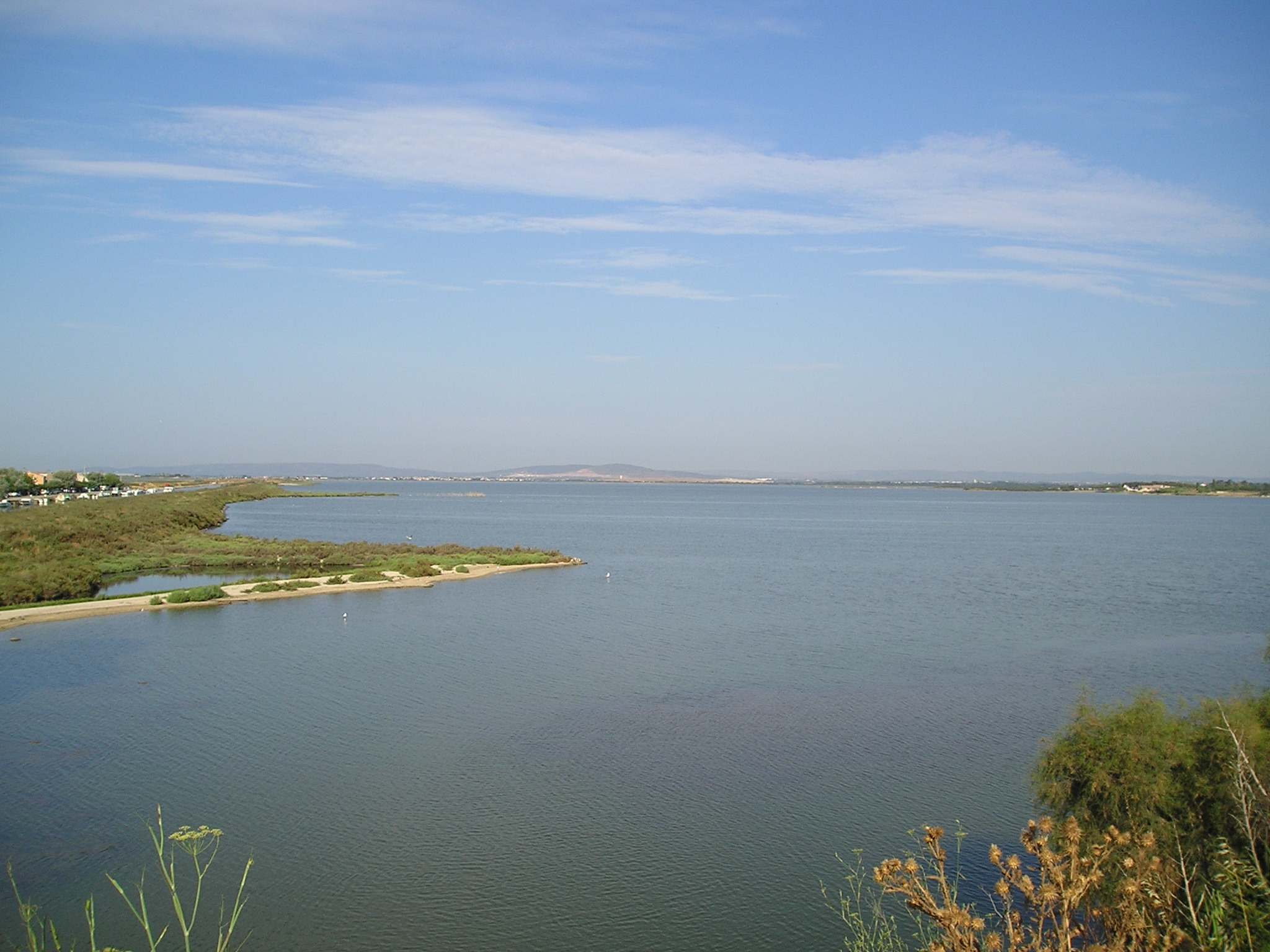 L'étang de Pérols et du Méjean (communes de Lattes au second plan et de Pérols au premier plan) vue depuis la montée du pont de Carnon, à Pérols. A l'arrière-plan du milieu vers la gauche, le massif de la Gardiole. Cette image est au sud de Image:Nord_Etang_Mejean_15072006.JPG.